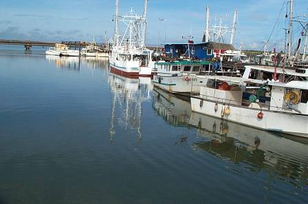 description:port de Larivot auteur : didwin